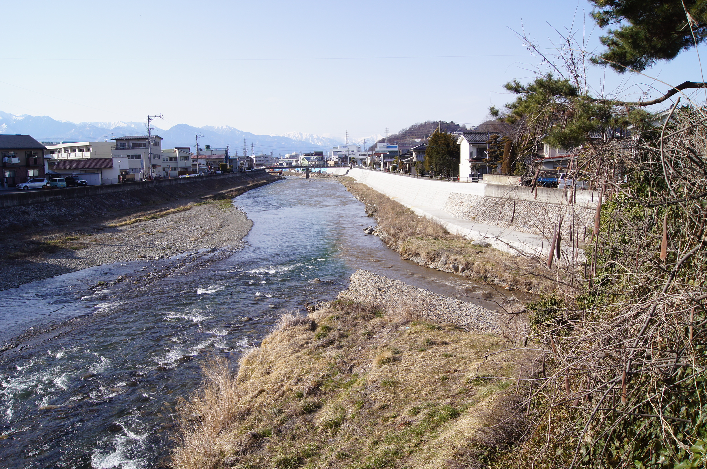 女鳥羽川と田川の合流地点（長野県松本市の巾上と白板の間）。右が女鳥羽川であるが、この日は水が濁っていた。